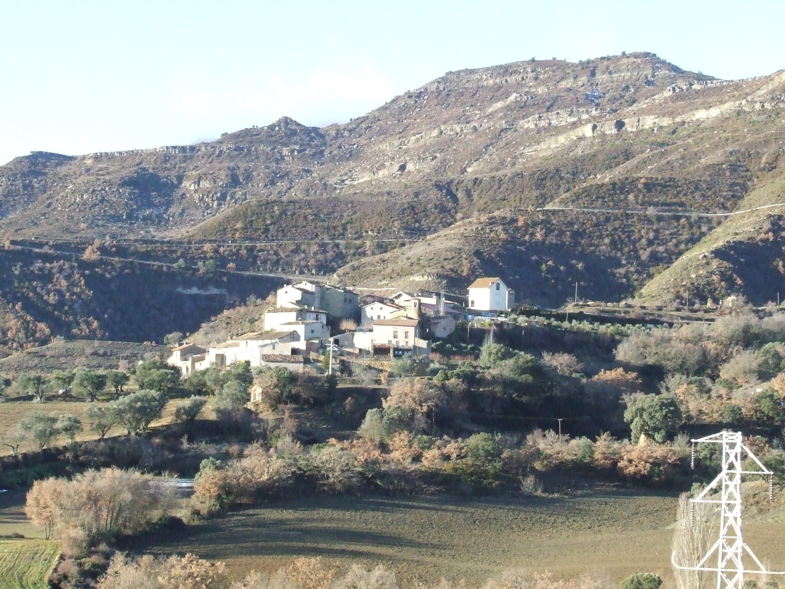 Vista general de Fígols de Tremp des del nord-est (Tremp, Pallars Jussà)